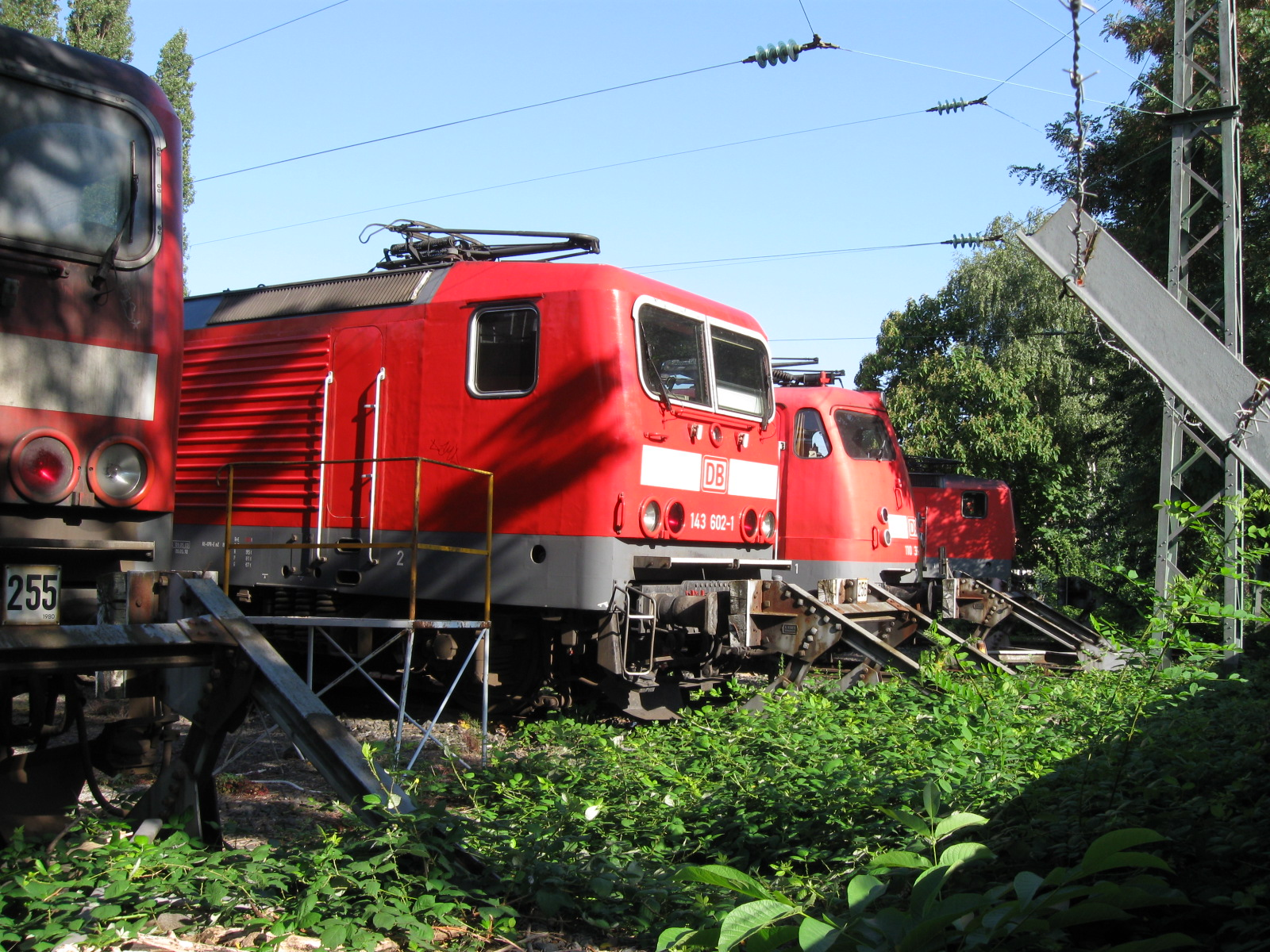 diverse Ellok im Abstellbahnhof Düsseldorf-Eller